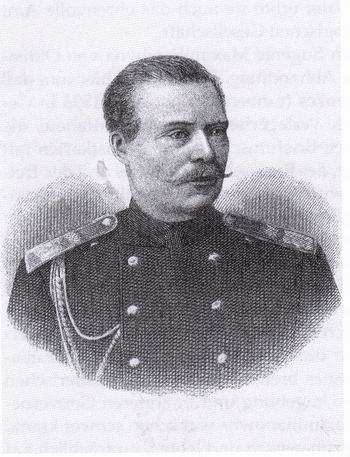 Alexander von Oldenburg